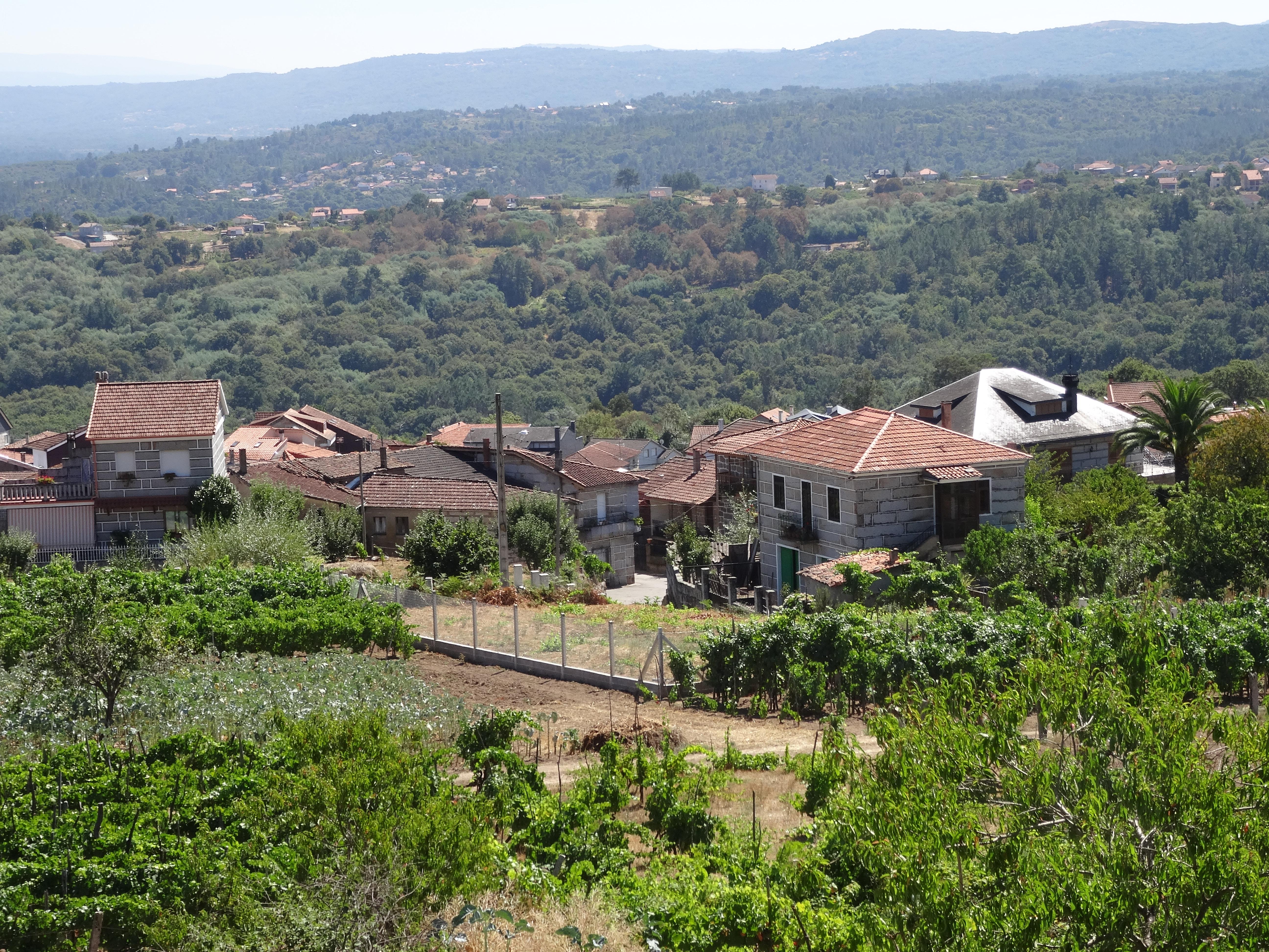 Ver título.